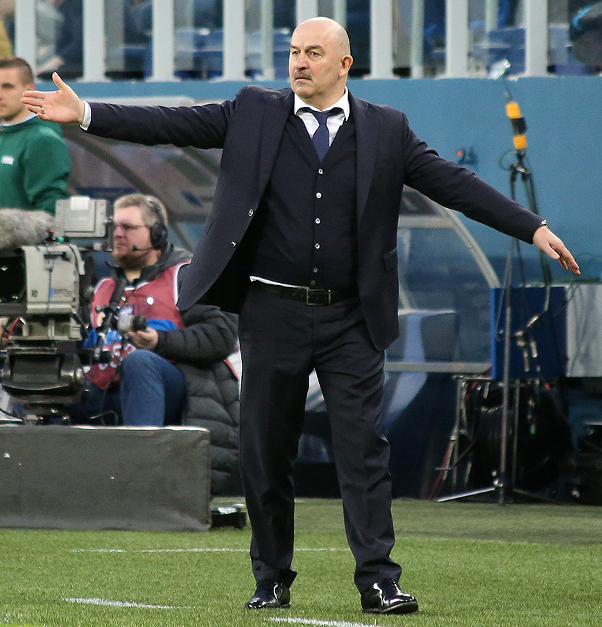 Сборная России проиграла французам